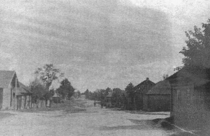 Беларуская (тарашкевіца): Манастыршчына (Manastyrščyna)